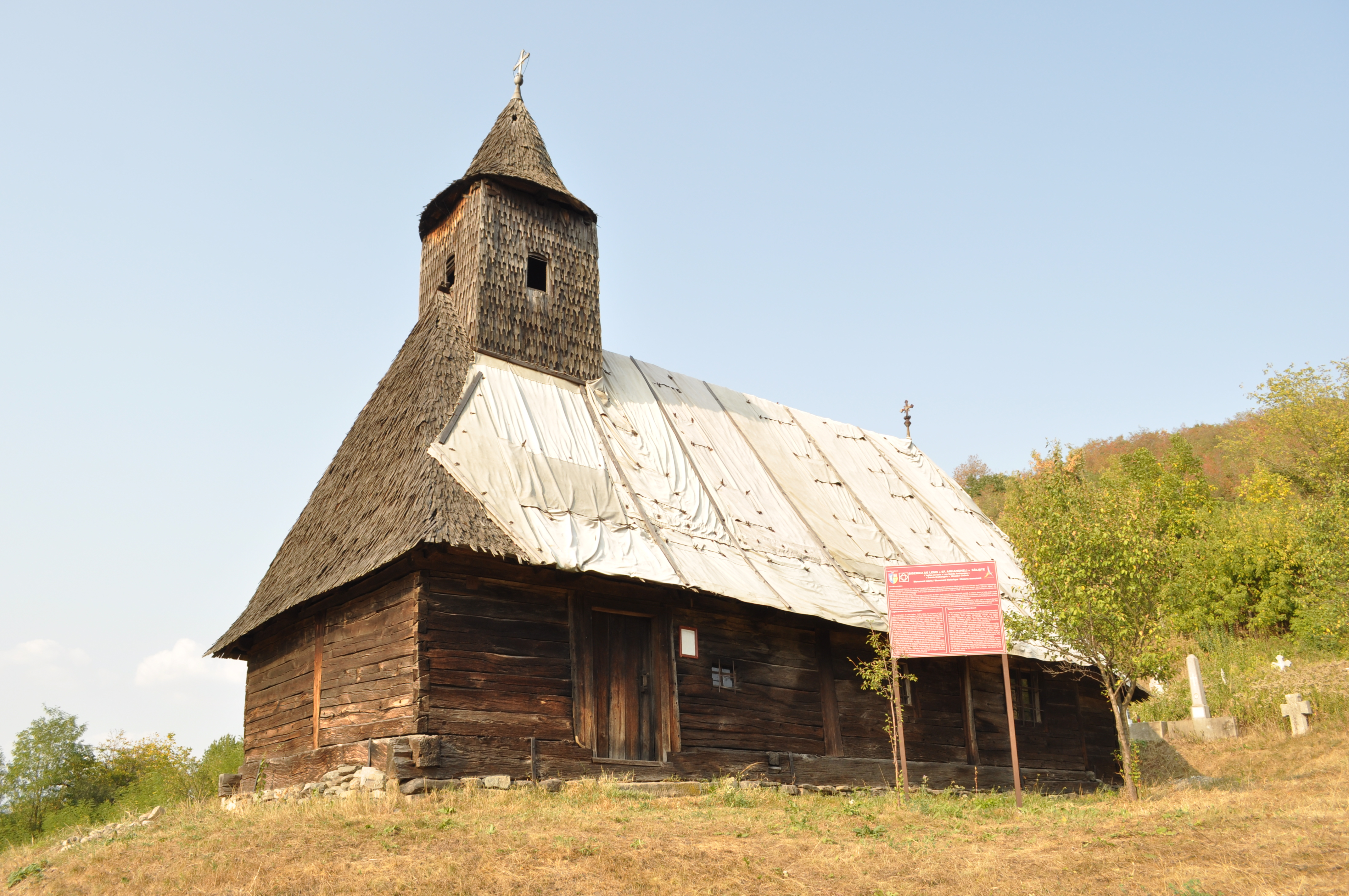 Biserica de lemn „Sfinții Arhangheli” din Săliștea, județul Alba